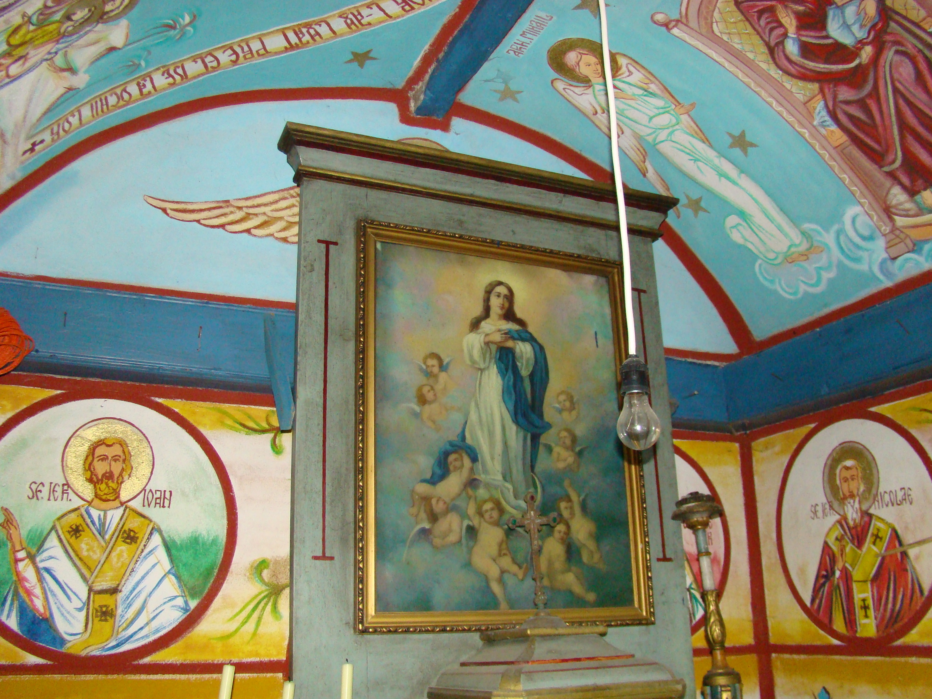 Biserica de lemn "Sf. Ioan Evanghelistul" , sat IZVOARELE; comuna CERNEŞTI